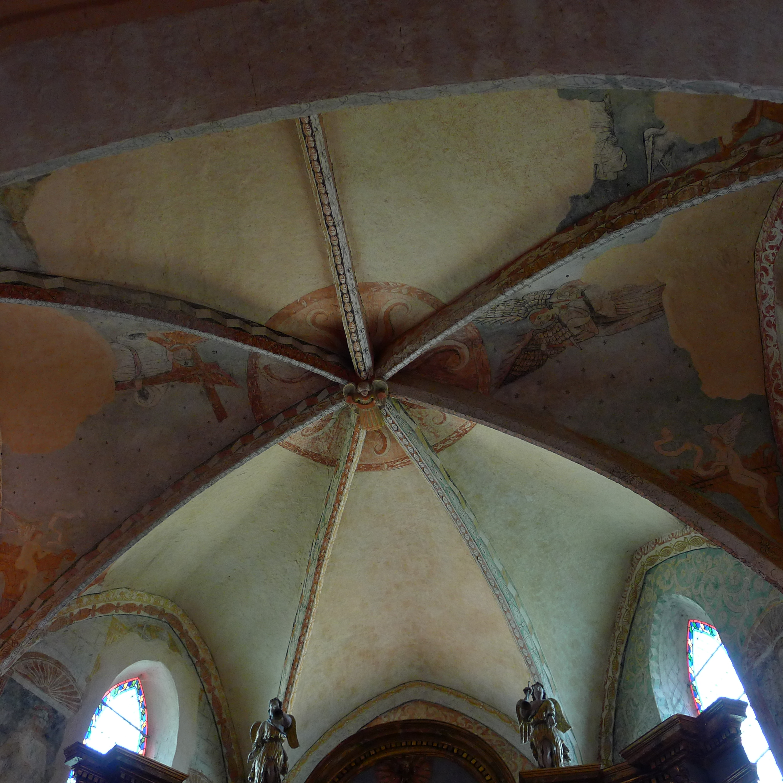 Fresques sur les voûtes du choeur représentant des anges tenant les instruments de la Passion